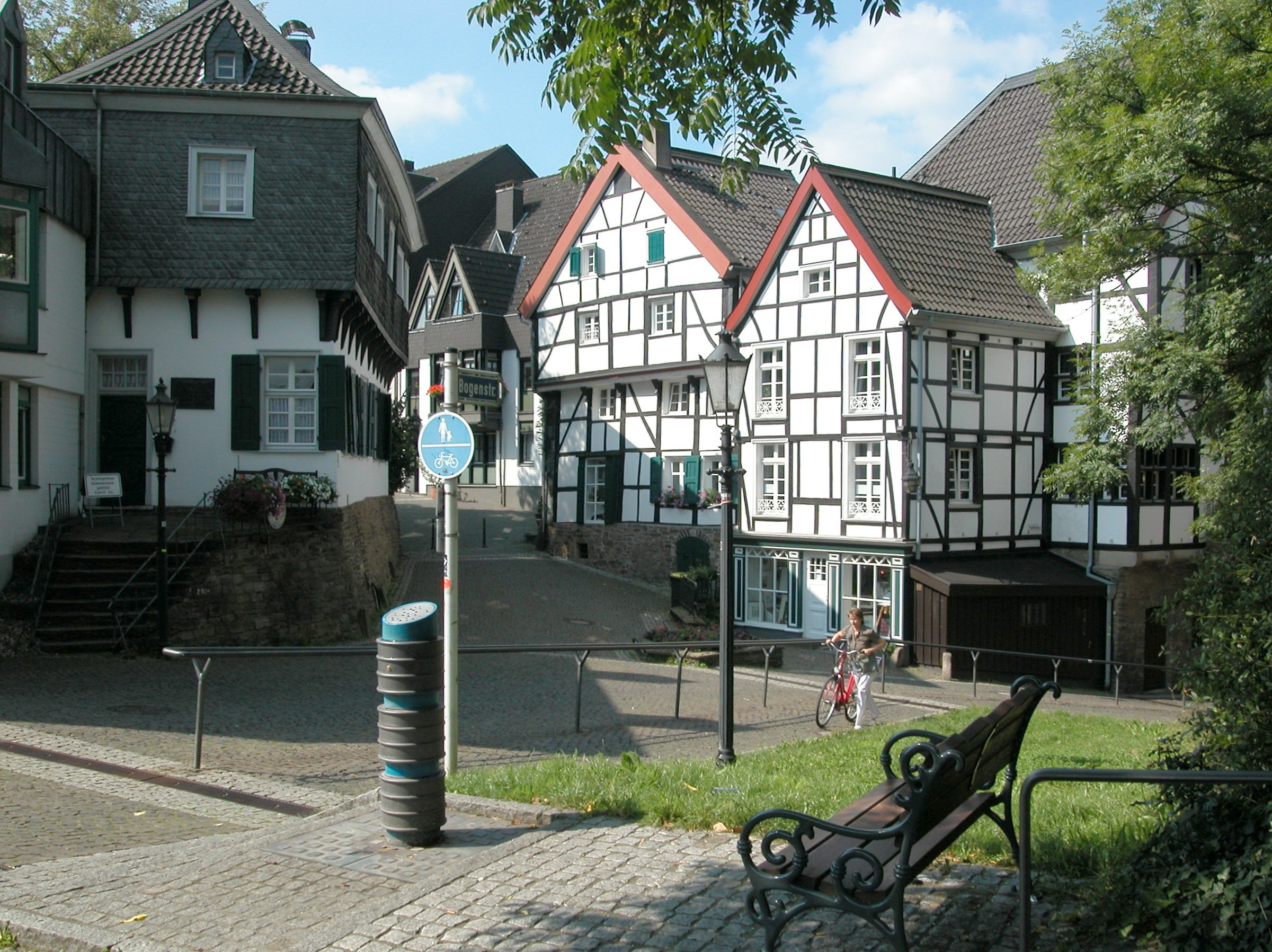 Die Mausefalle